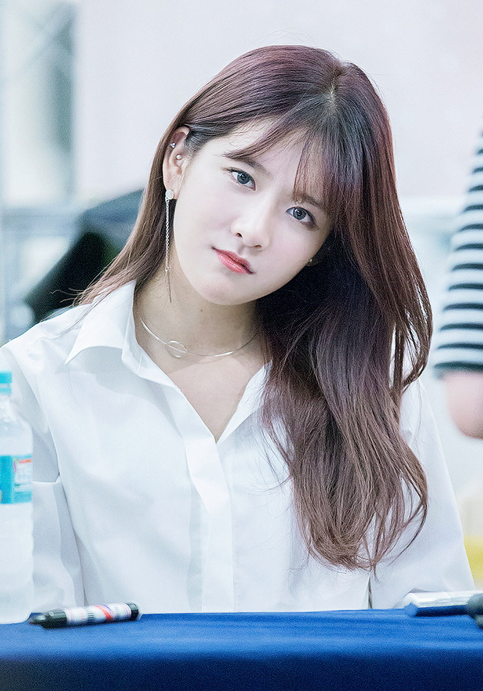 160821 우주소녀 영등포 팬싸인회 엑시